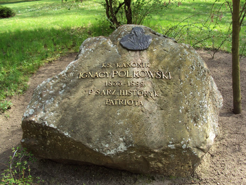 Kamień upamiętniający Ignacego Polkowskiego, znajdujący się w pobliżu pałacu w Lubostroniu.